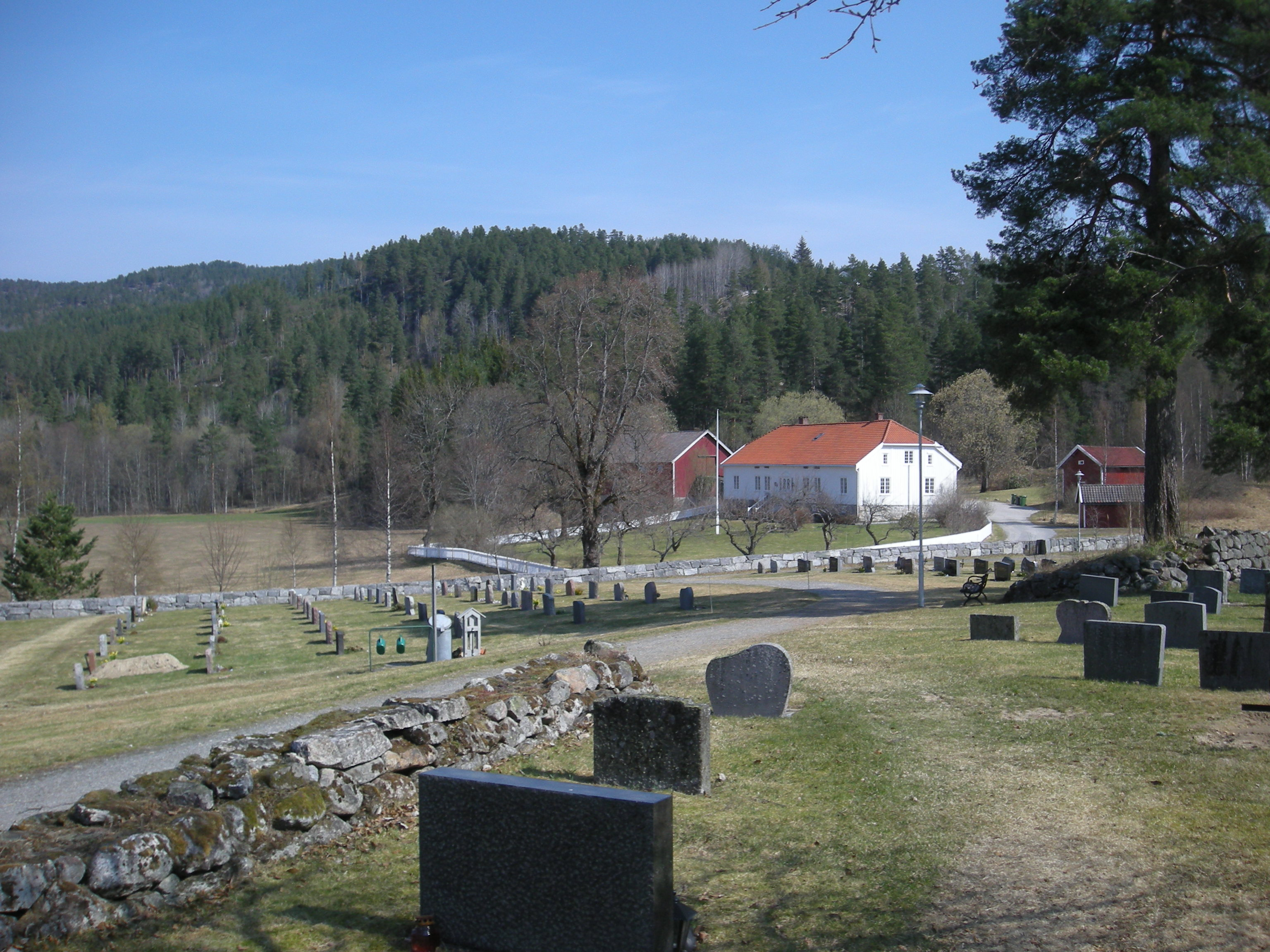 Evje prestegård, Aust-Agder